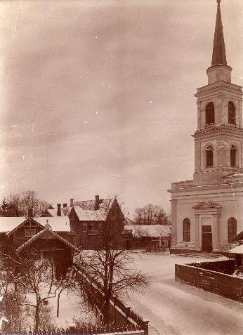 Maarja kiriku esine 1892